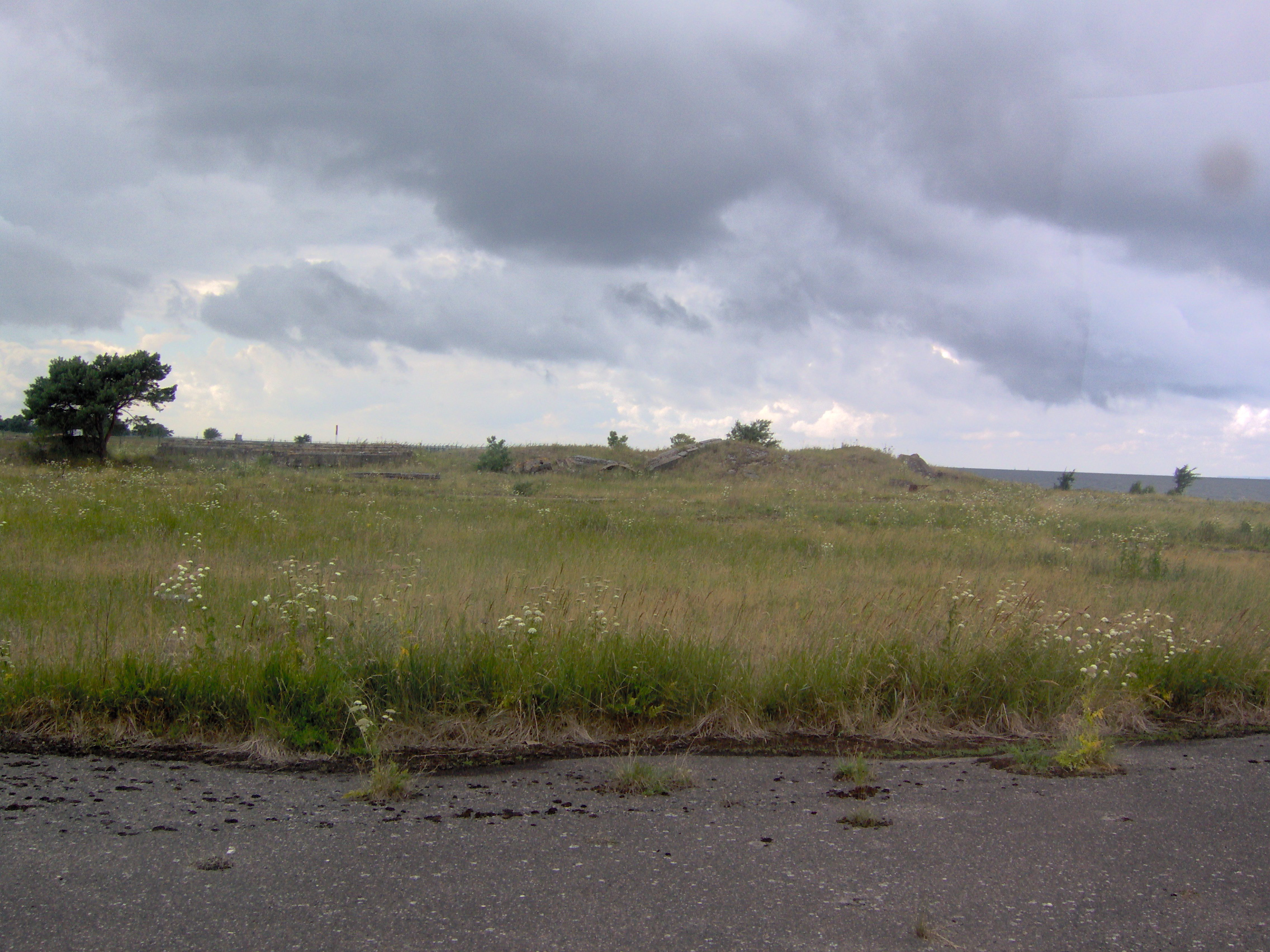 Überreste einer V1 Startanlage am nordöstlichen Ende des Flugplatzes Peenemünde